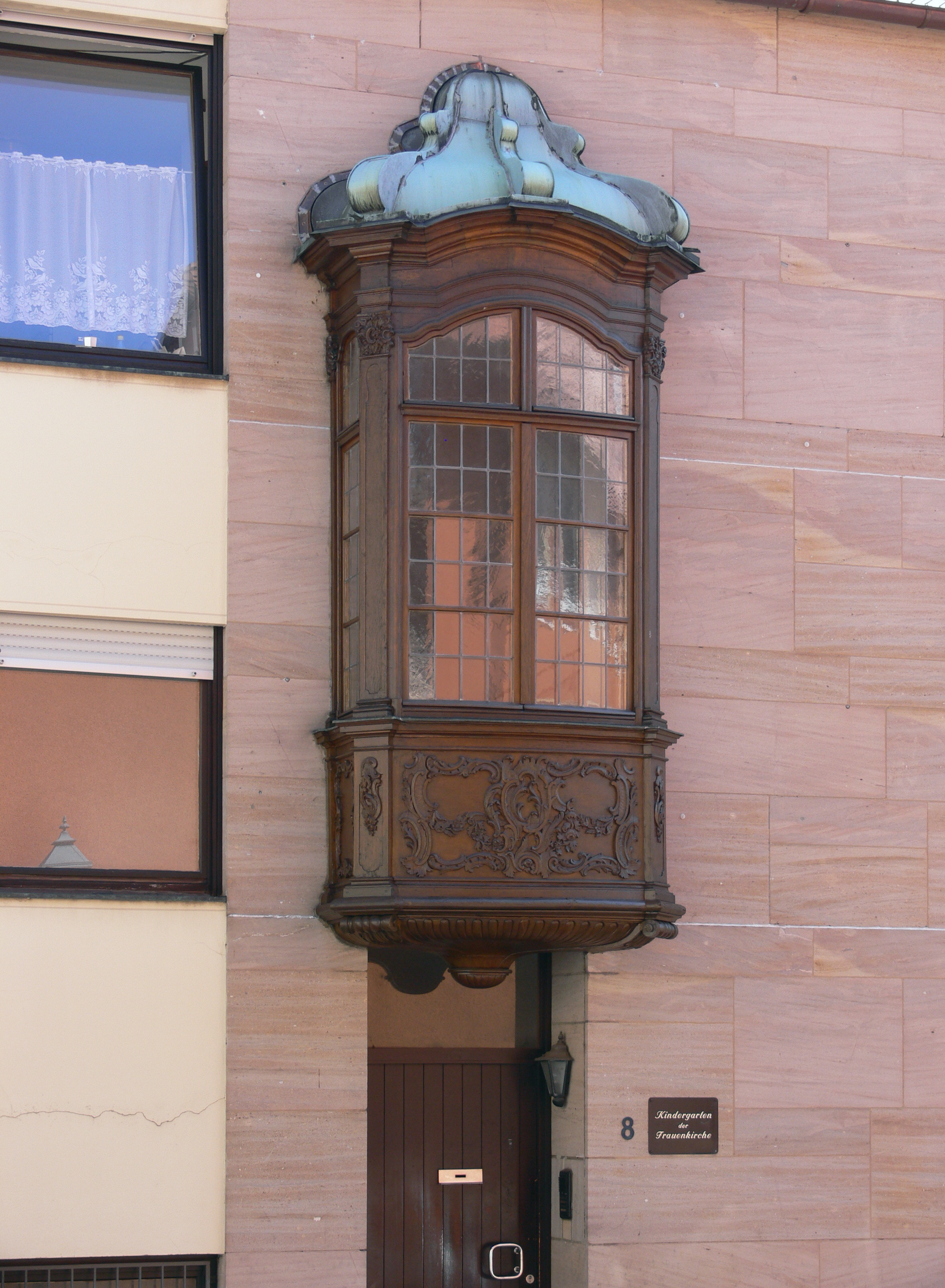 Nürnberg, Chörlein des Hauses Radbrunnengasse 8, Kindergarten der Frauenkirche